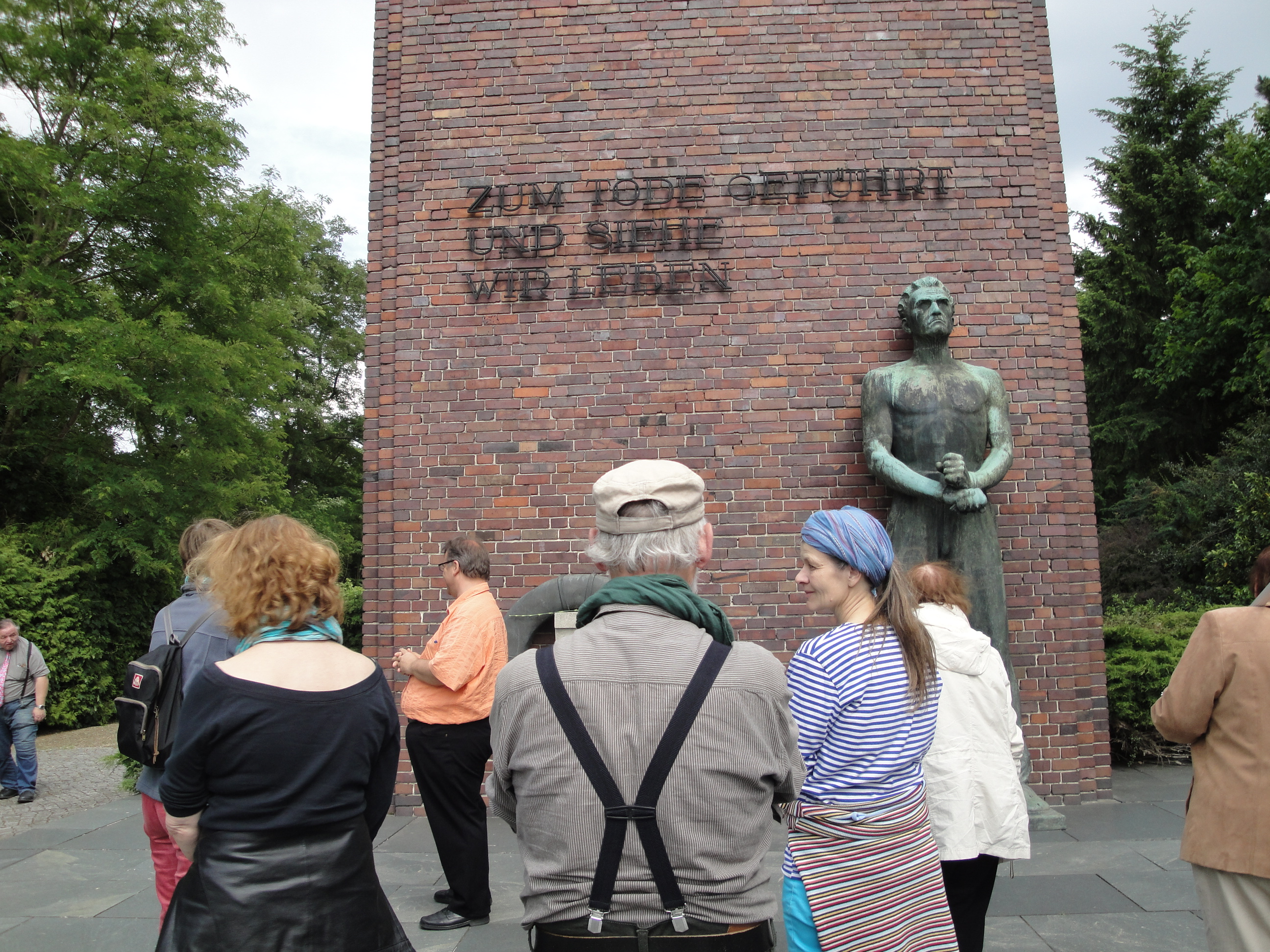 Gedenkstätte für die ermordeten Antifaschisten in Brandenburg an der Havel, Marienberg